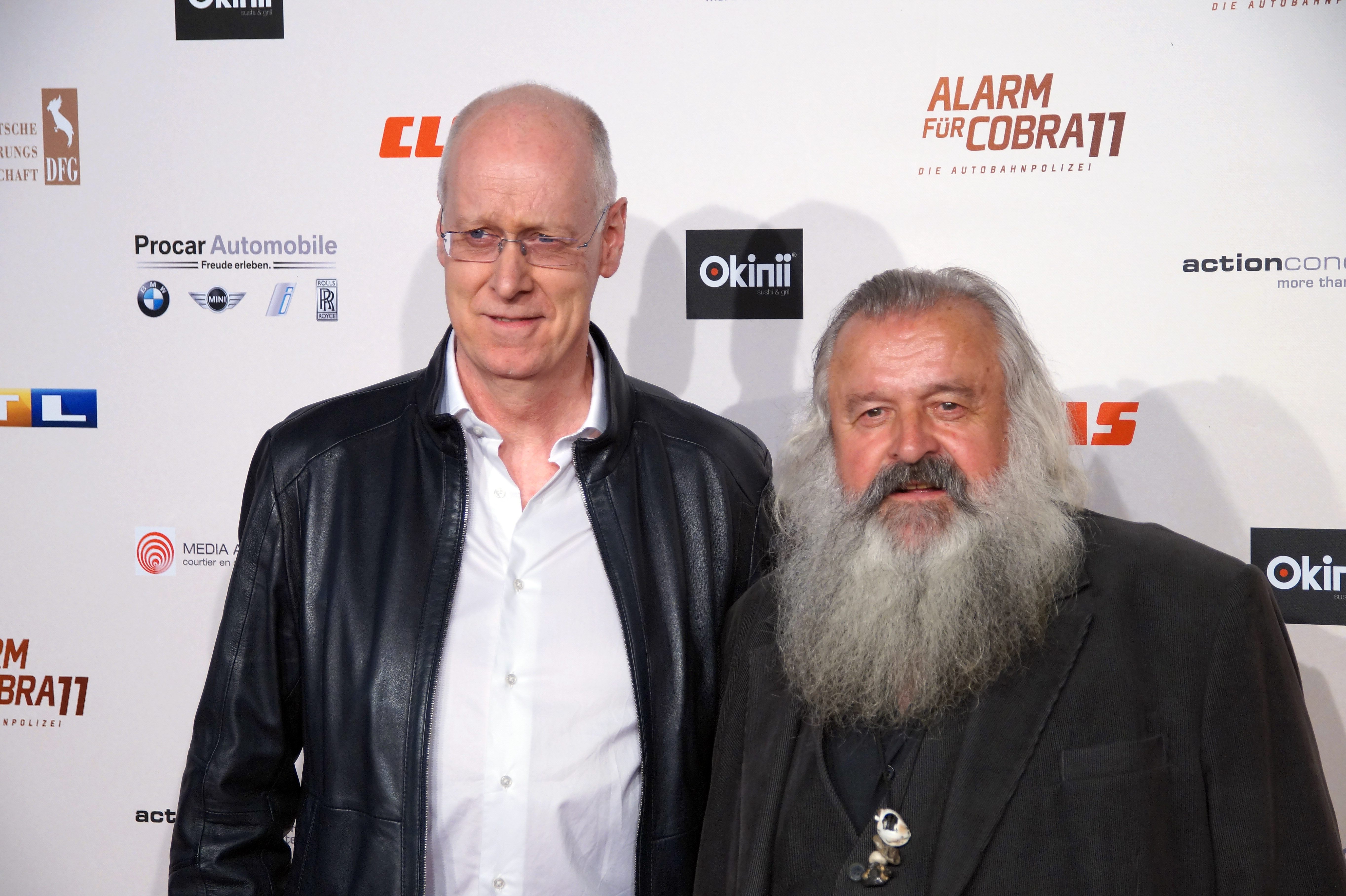 Gottfied Vollmer & Dietmar Huhn bei der Premiere der 300. Folge 'Alarm für Cobra 11', April 2016.